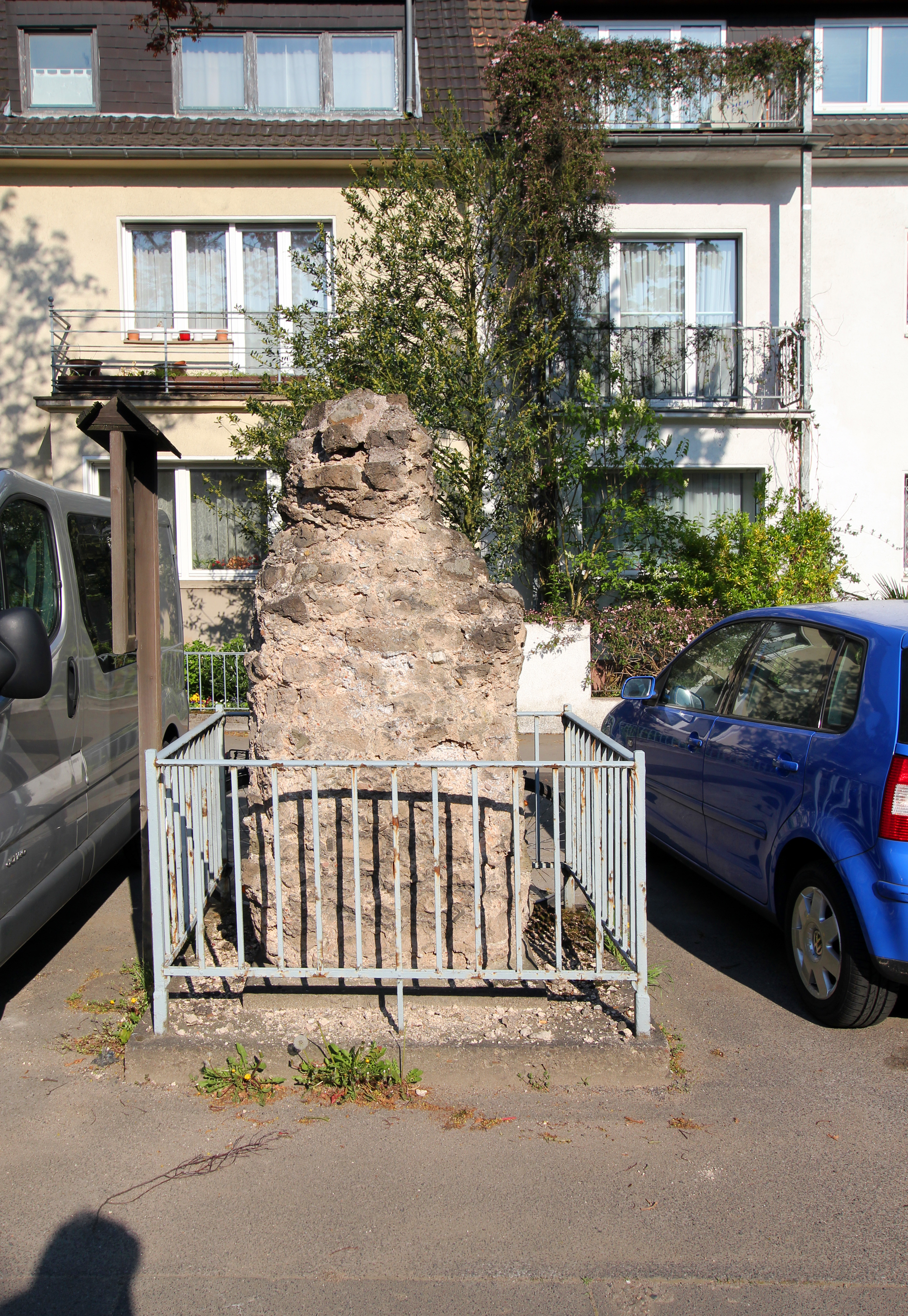 Köln-Sülz, Berrenrather Straße 436. Restpfeiler der römischen Wasserleitung